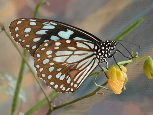 Tirumala limniace adult butterfly